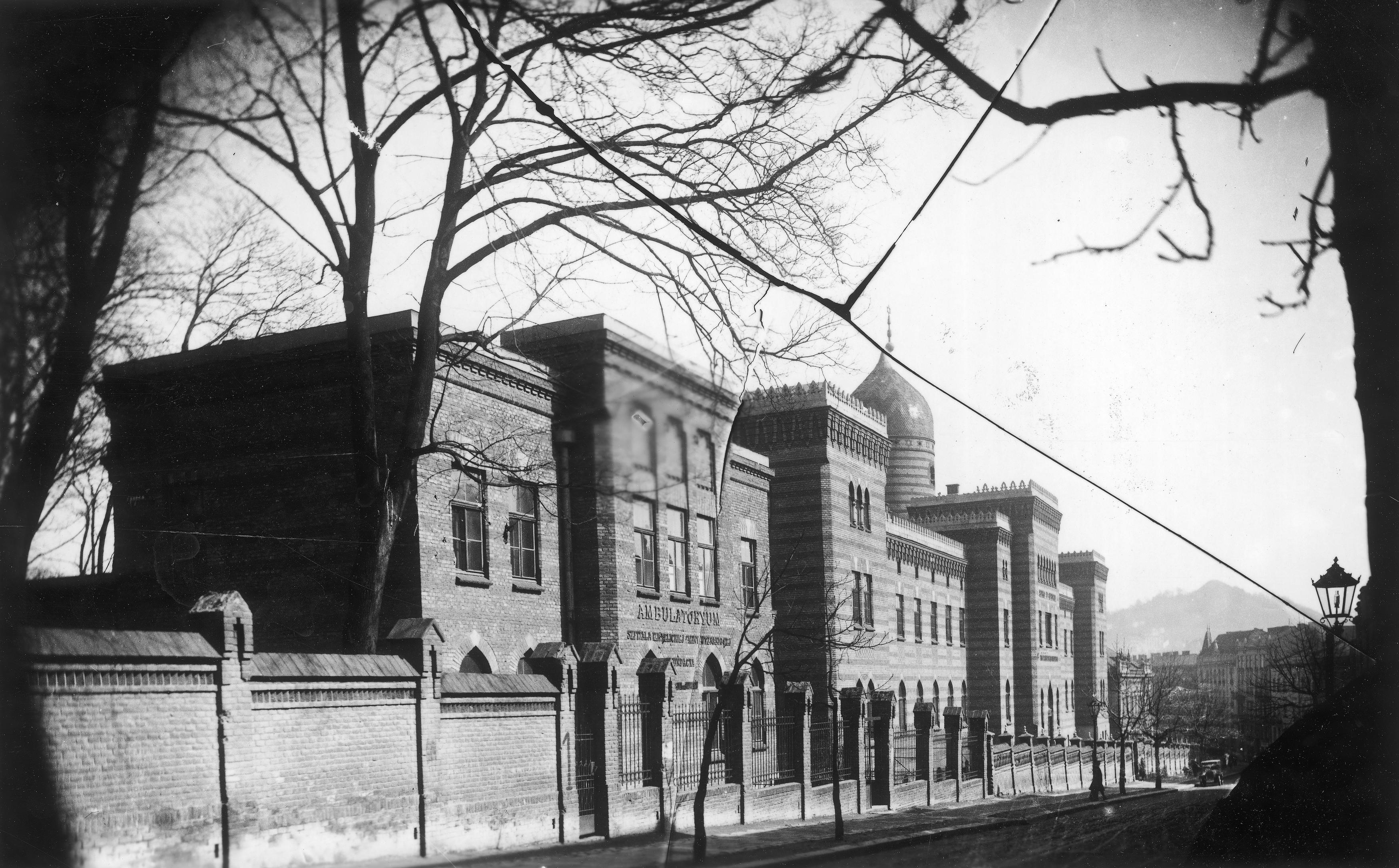 Пологовий будинок на вулиці Раппапорта у Львові. Колишній єврейський шпиталь. Збудований за проектом Казимира Мокловського у 1902 році.